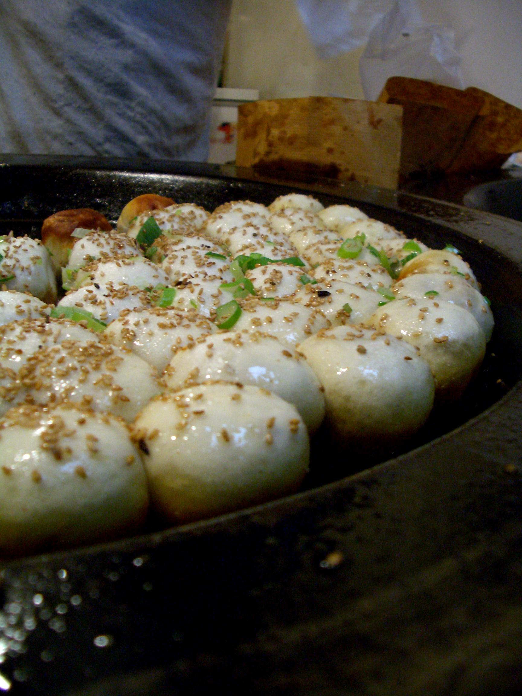 生煎饅頭（中華人民共和国大連市）